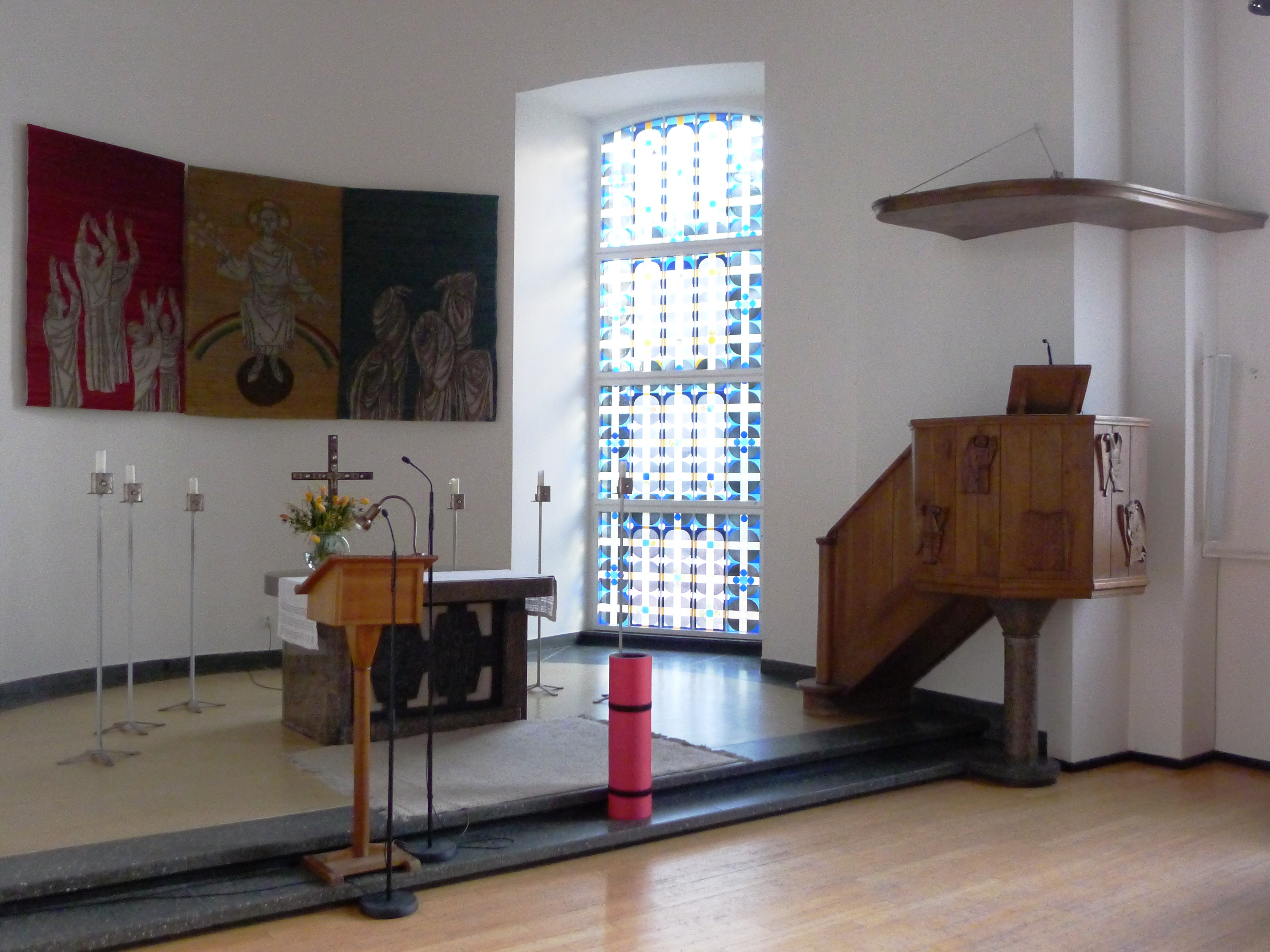 Apsis der Kirche mit Altar und Kanzel